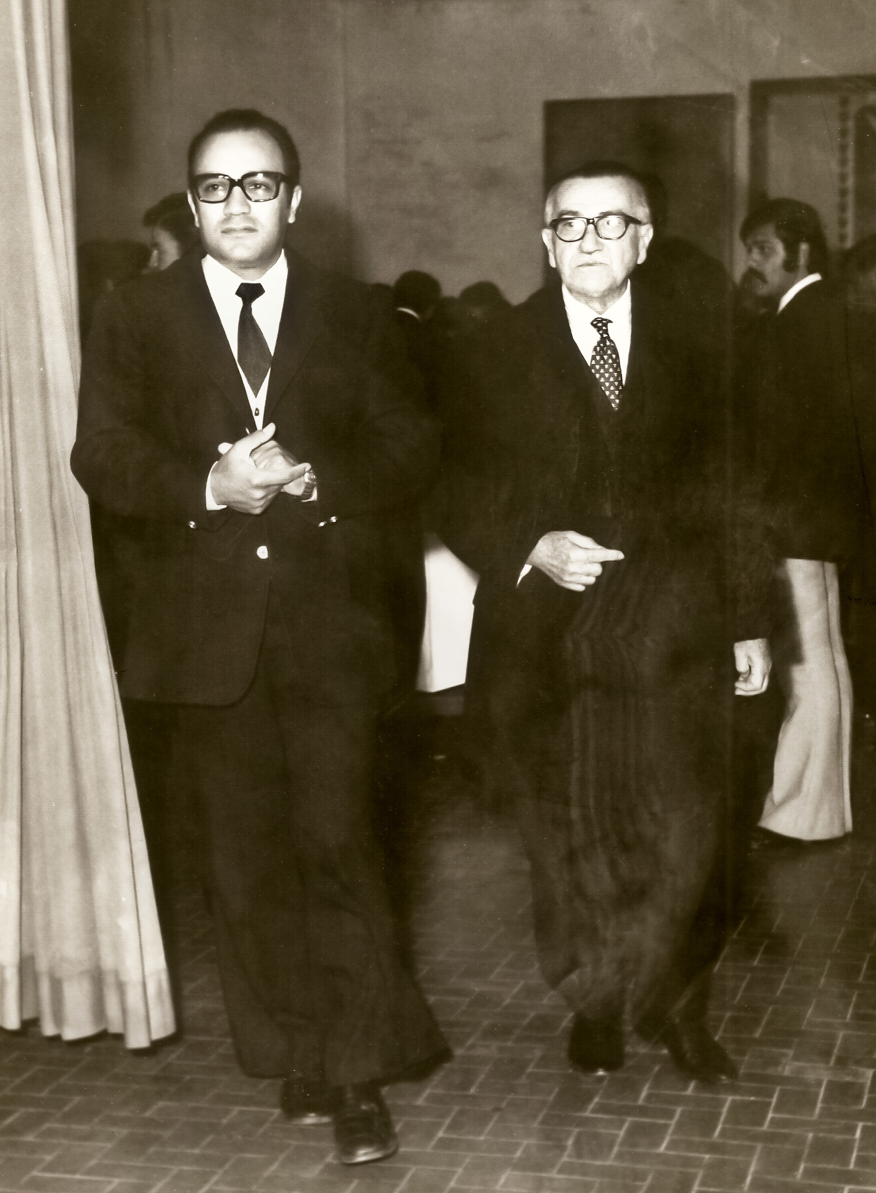 El Dr. Genaro Sánchez y el Dr. Juan Ramón Chaves, en los años 70s